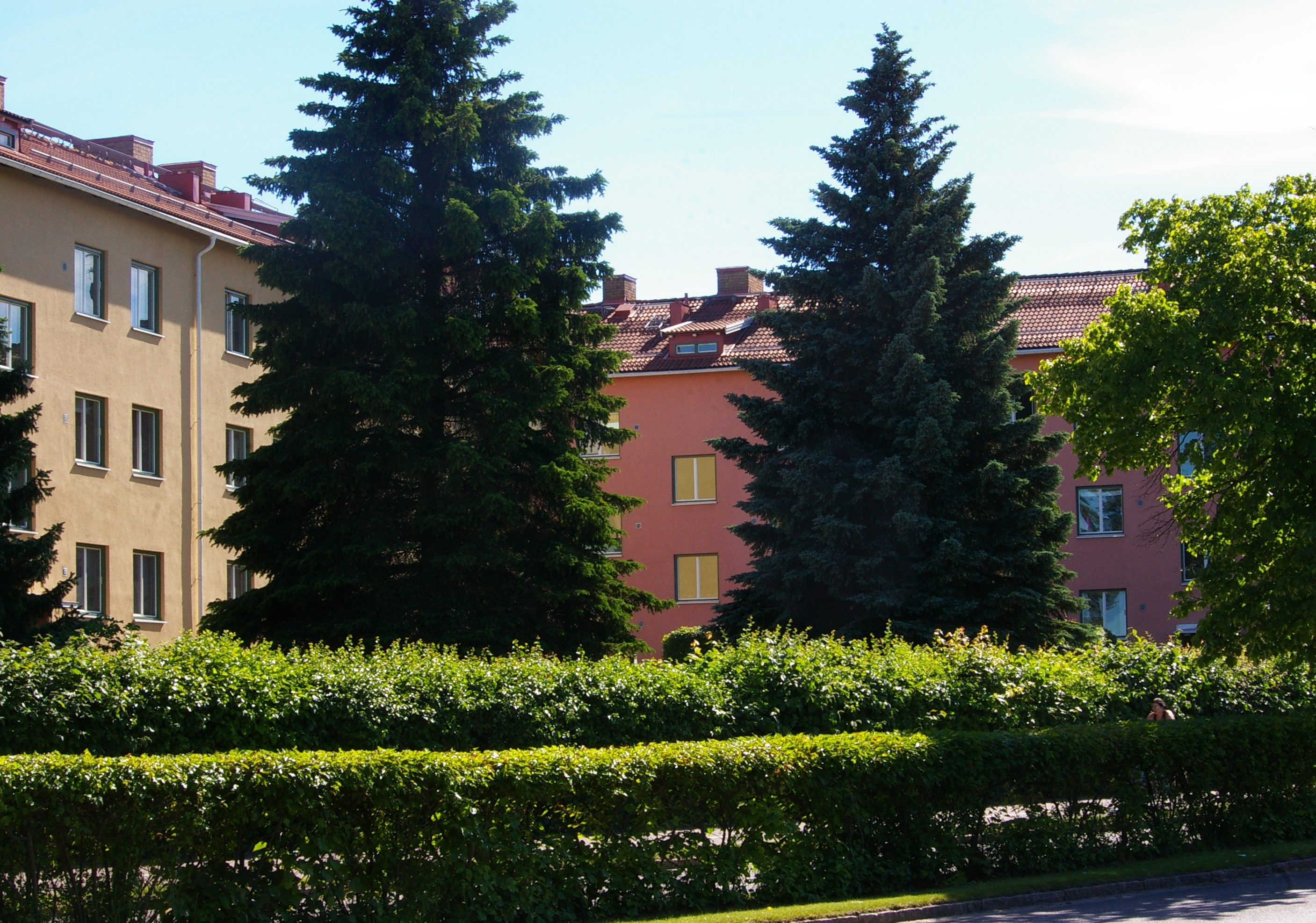 Flerfamiljshus i stadsdelen Östra Valla i Linköping. Fotograferat från Malmslättsvägen.